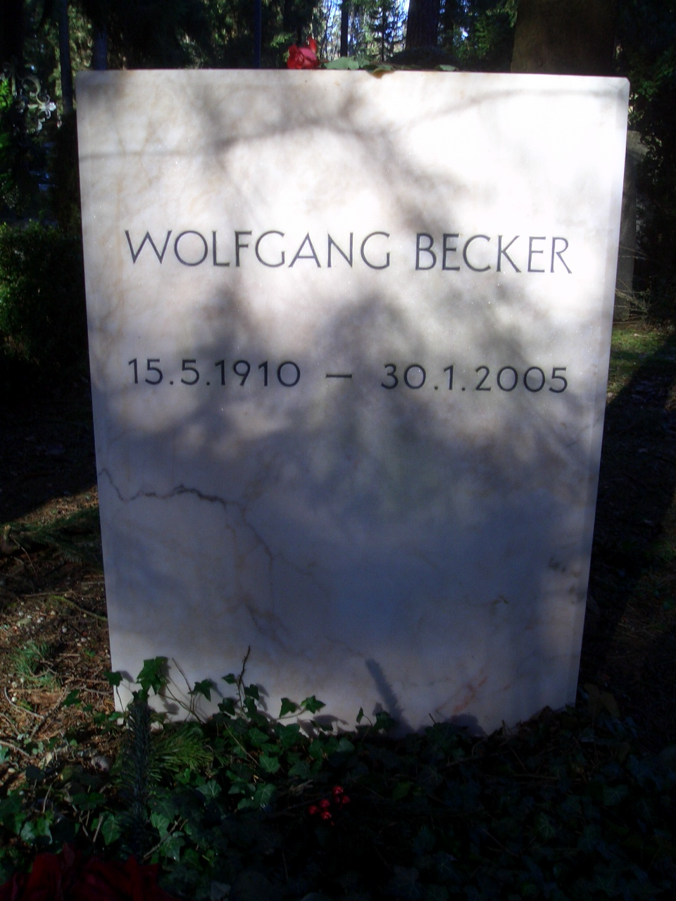 Grabstein des Film-und Fernsehregisseurs (z.B. "Derrick") Wolfgang Becker auf dem Waldfriedhof Grünwald